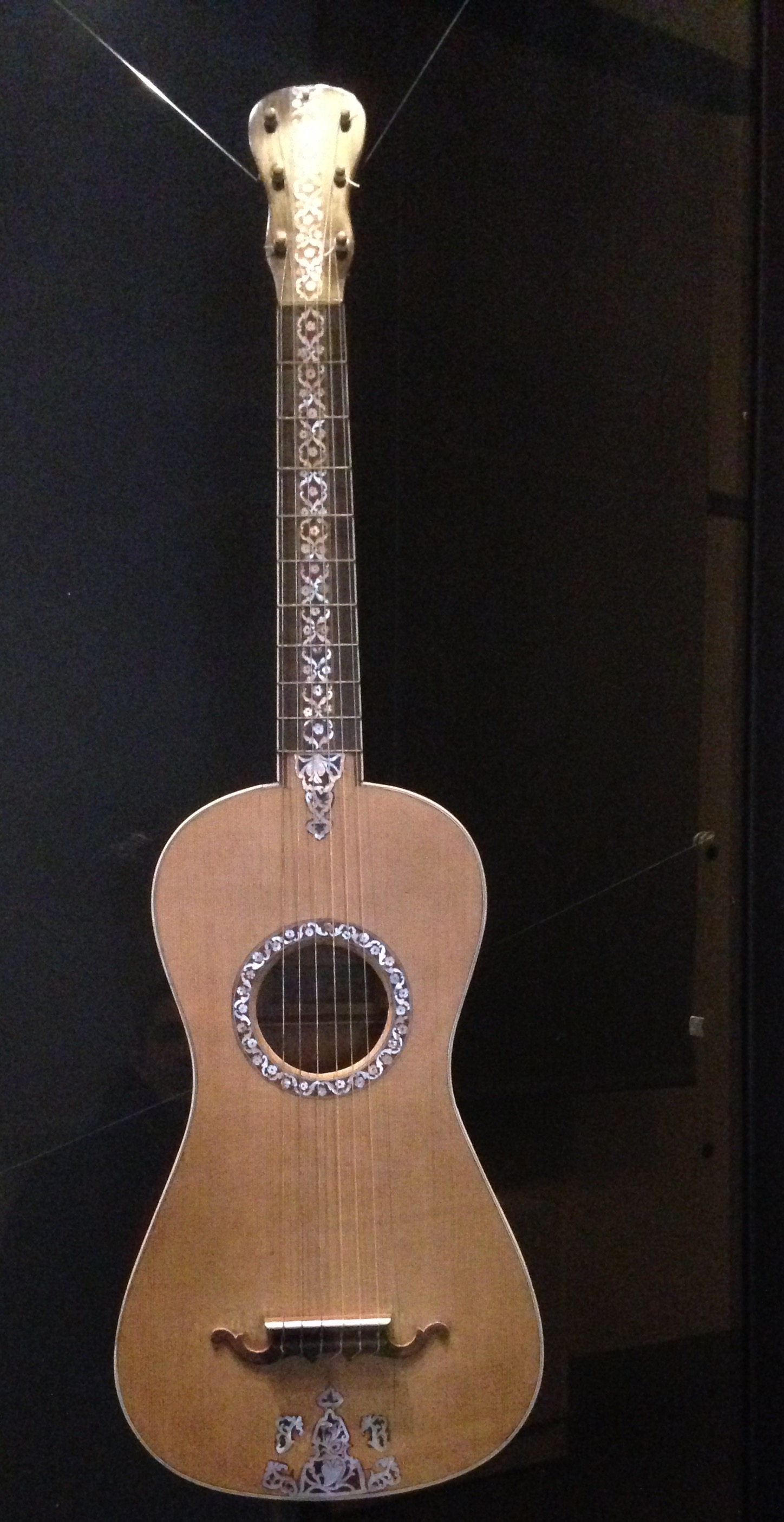 chitarra sei corde Fabricatore del 1795, Napoli. Esposta al Museo degli strumenti musicali di Milano.